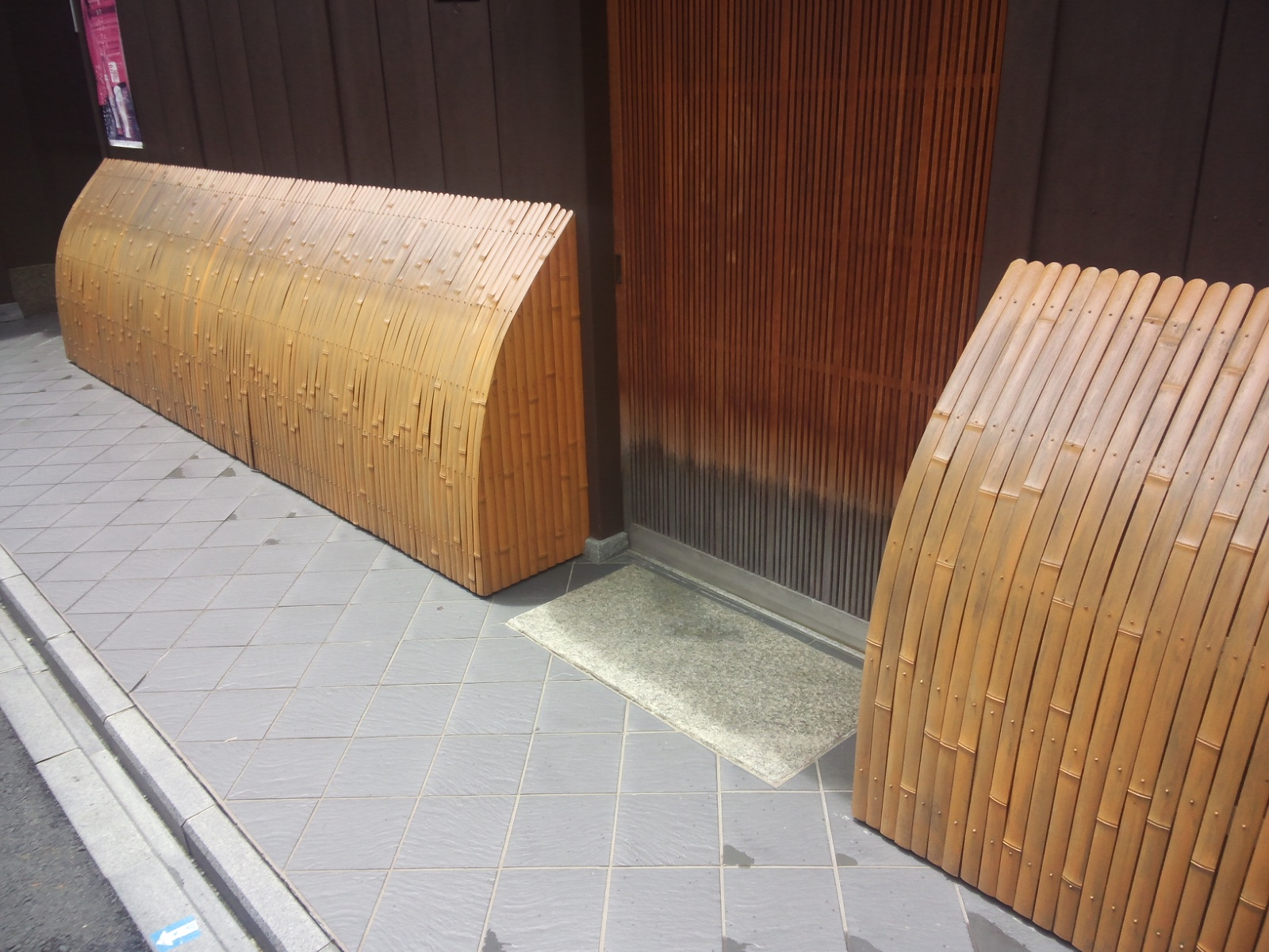 先斗町 竹矢来